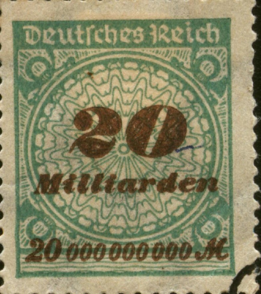 20milmillones - Escaneado de un sello de mi collección